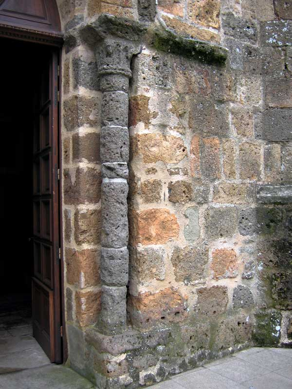 Colonne de l'église de Rochechouart, Haute-Vienne, France. L'église a été fabriquée avec des pierres extraites des carrières de la région. Ces roches sont la conséquence d'un impact météoritique qui a eu lieu il y a 214 millions d'années car la ville se trouve dans l'Astroblème de Rochechouart-Chassenon.